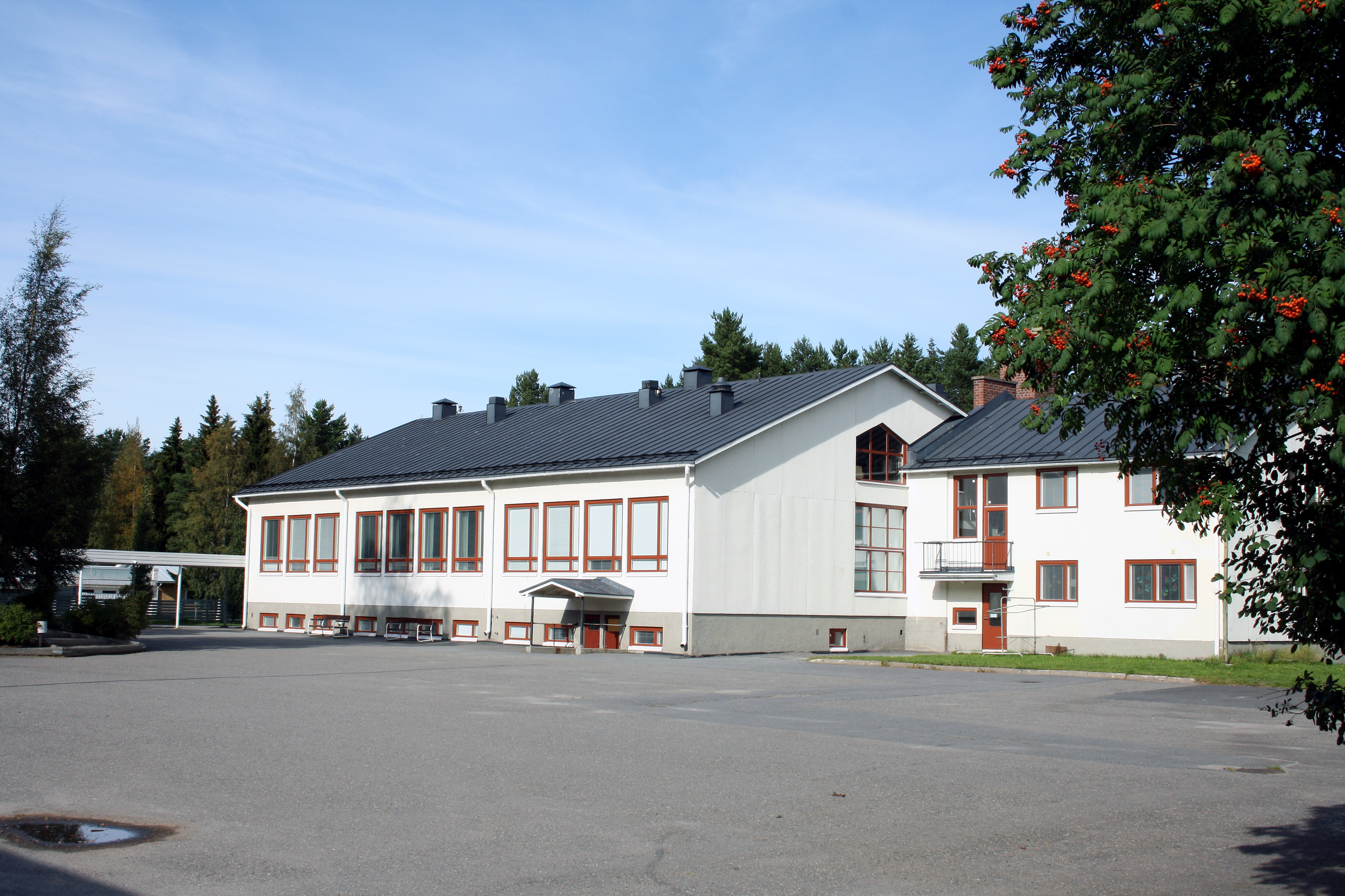 Halkokarin koulu Kokkolassa.